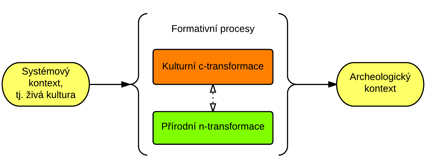 Přemena živé kultury na archeologický kontext za účasti formativních procesů